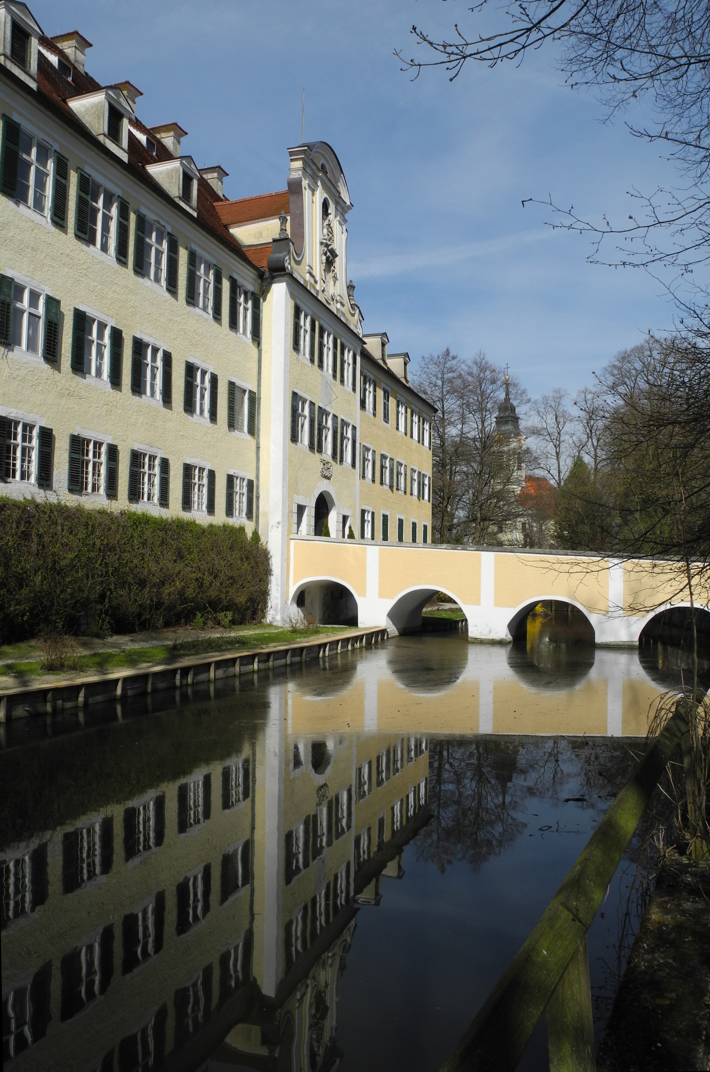 Schrobenhausen-Steinbrücke zum Schloss Sandizell